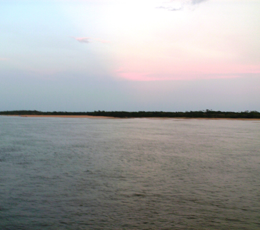 Rio Branco